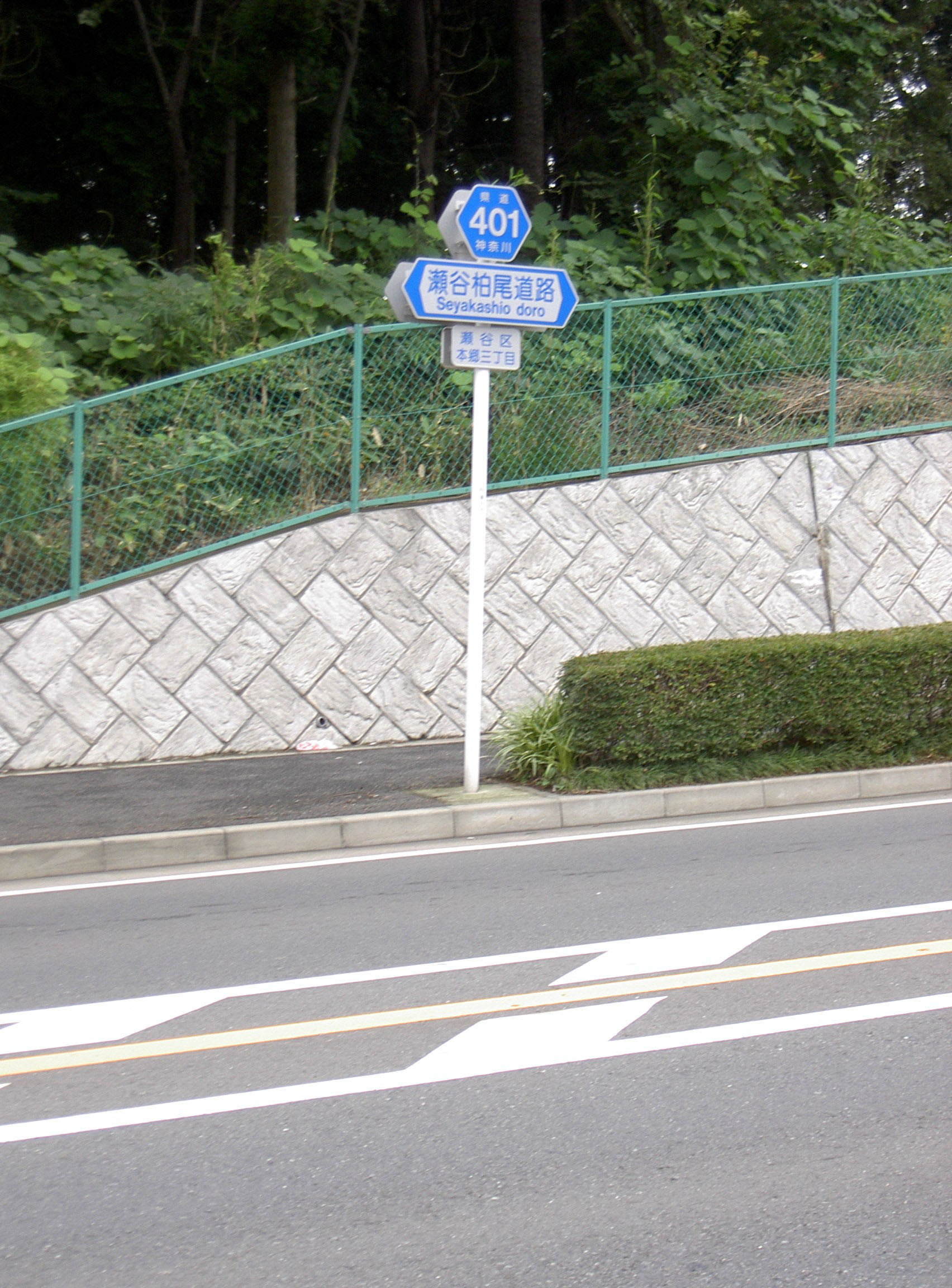 Kanagawa Prefectural Road Route 401 ja: 神奈川県道401号瀬谷柏尾線